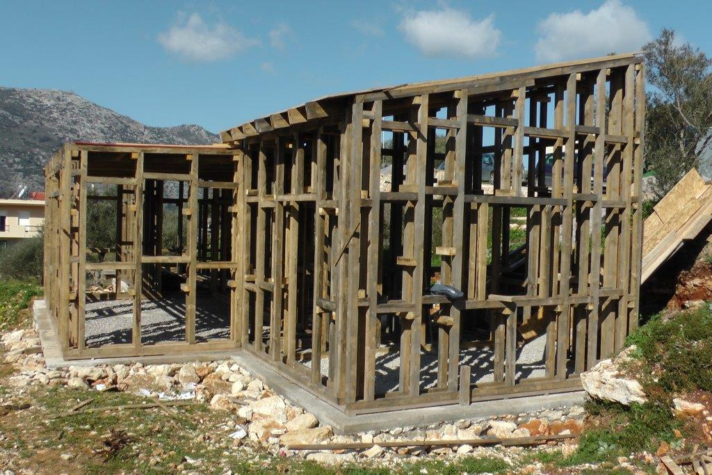 Ξύλινος σκελετός στις Αρχάνες Κρήτης.